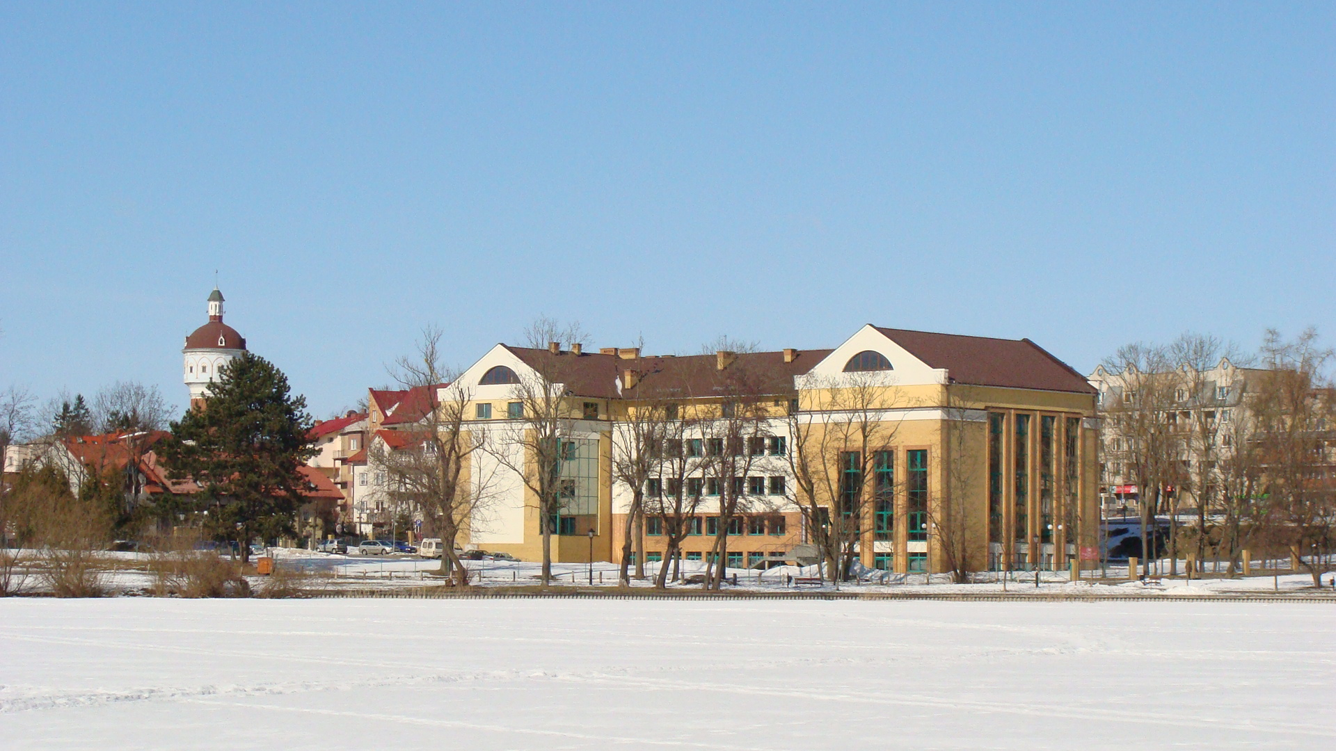 WSFiZ